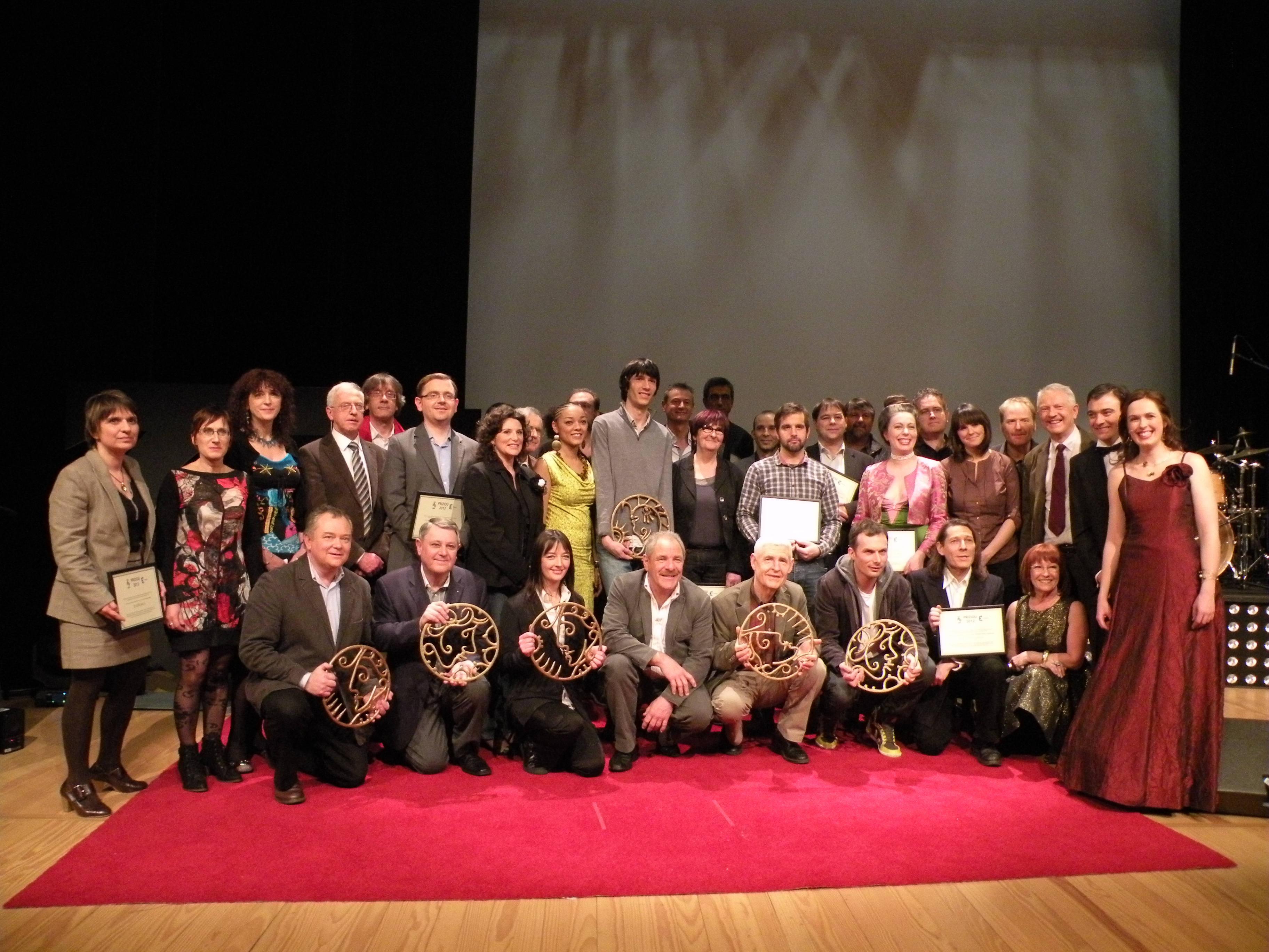 Lauréats et nominés des Prizioù 2012 sur la scène de la salle Hubert Curien aux Champs Libres de Rennes.